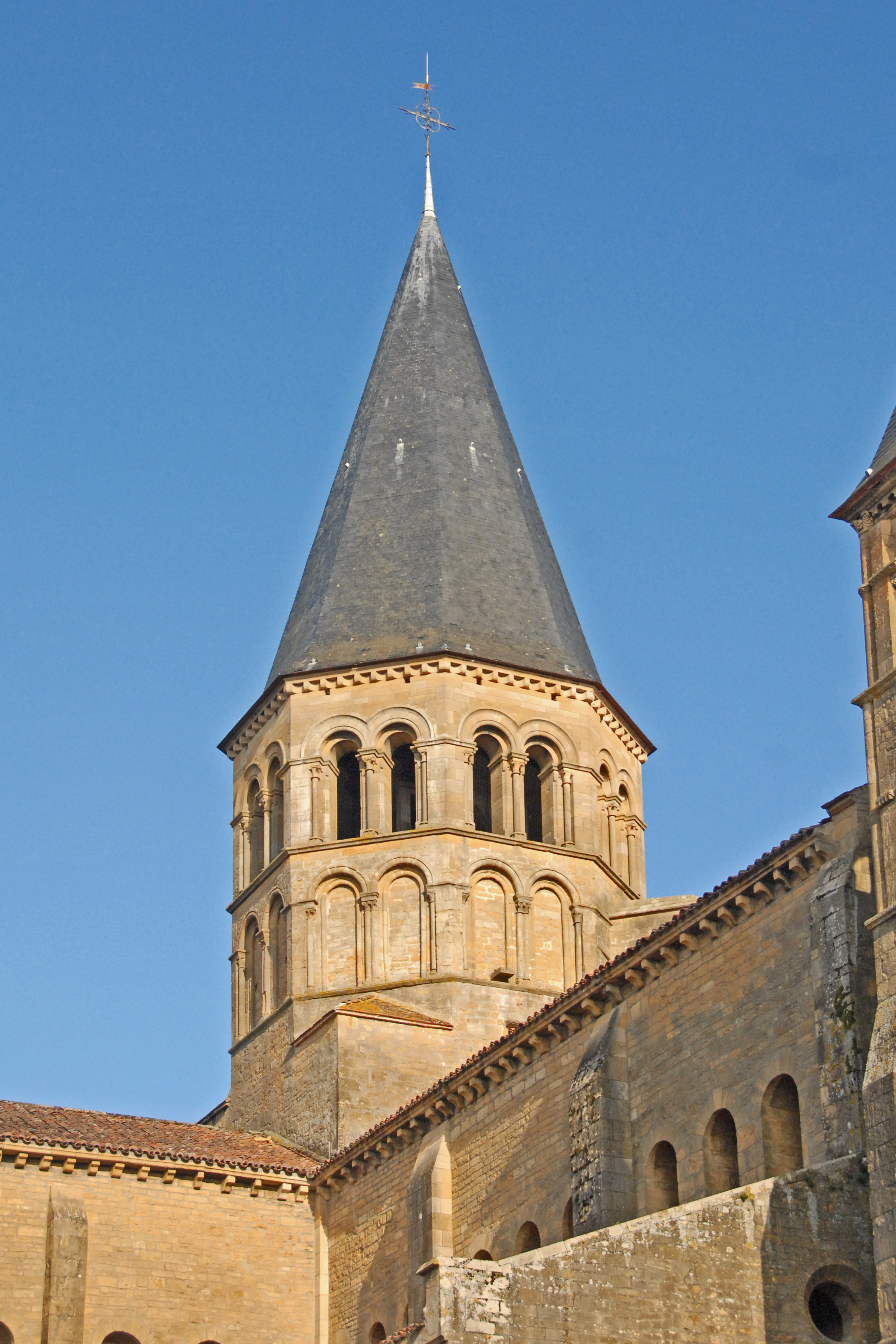 Vierungsturm von NW